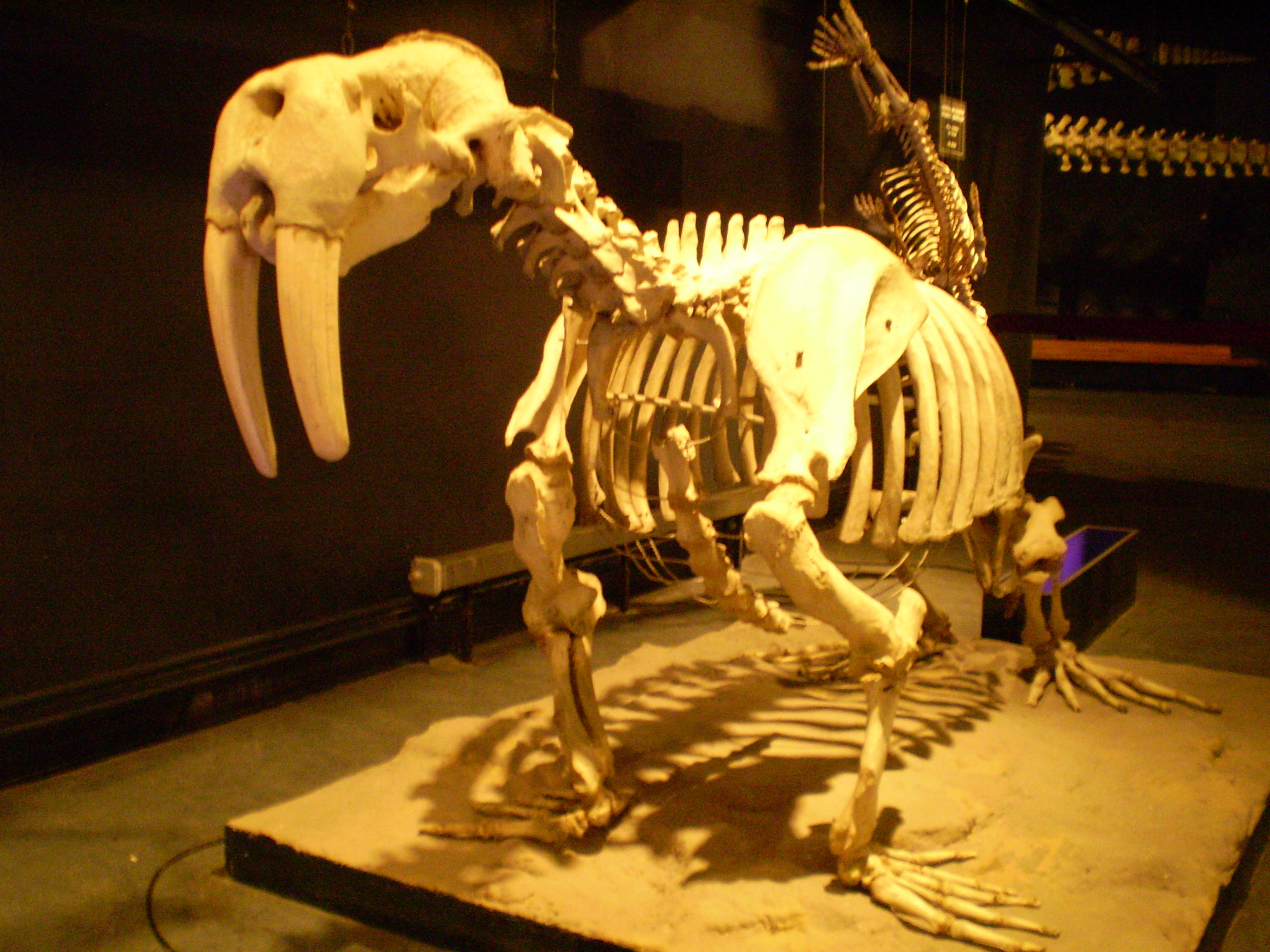 Squelette de morse, Institut Royal des Sciences naturelles de Belgique, Bruxelles